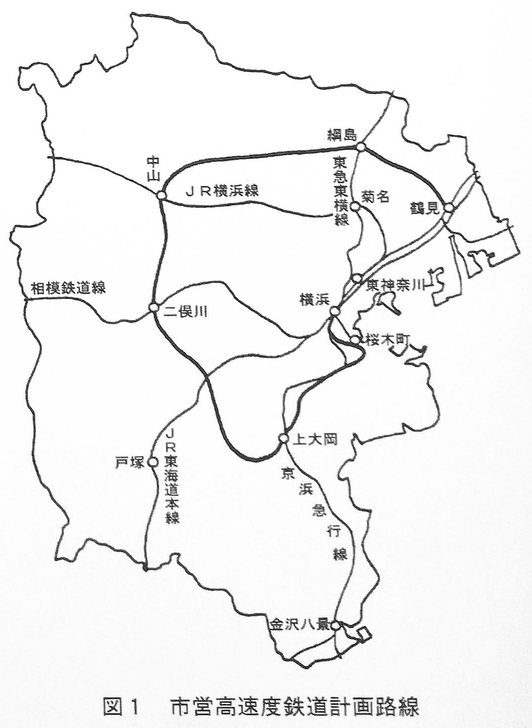 1957年の「横浜国際港都建設総合基幹計画」の交通網整備拡充計画で提案された、市営高速鉄道の新線建設計画の路線図。